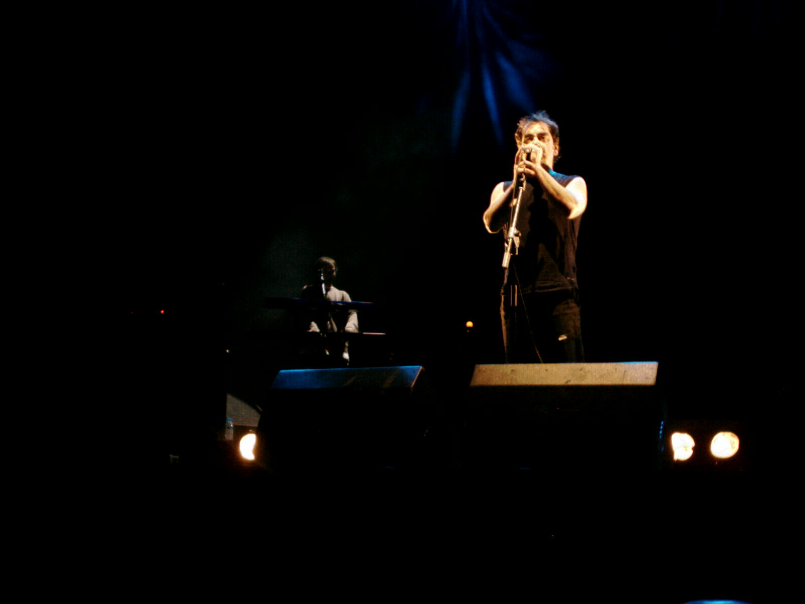 Hombres G actuando en Terra Mítica (Benidorm, Alicante, España) en uno de los conciertos de la gira "Peligrosamente juntos". Javier Molina (batería) en el centro de la imagen, cantando la introducción de "Venezia".